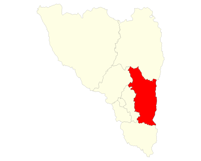 Localisation du district de Manjakandriana dans la région Analamanga